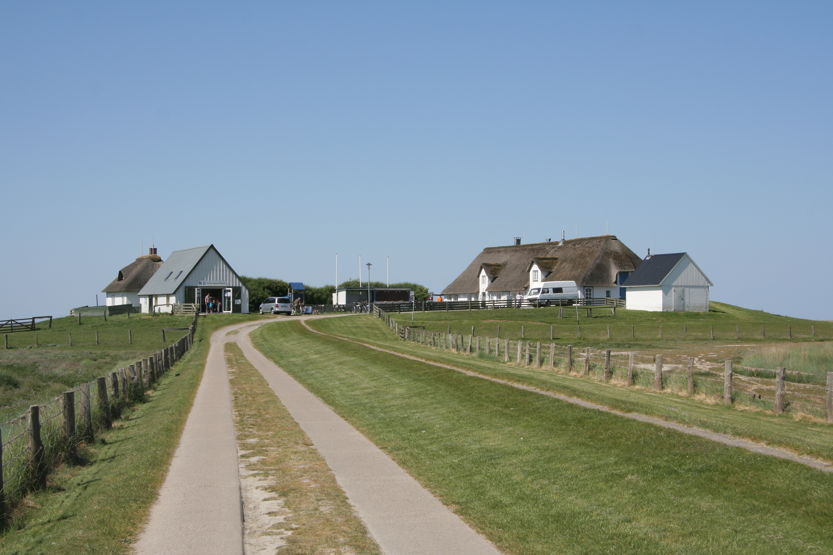 Gebäude auf der Hamburger Hallig